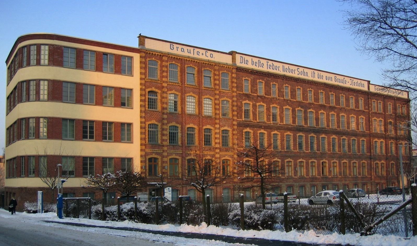 Description: Fabrikgebäude Brause & Co in Iserlohn, Brausestraße 13-15. 1892 aus Ziegelstein erbaut; 1916 und 1936 wurden Erweiterungsbauten vorgenommen. Source: selbst fotografiert Date: 27. Jan. 2006 Author: Asio otus